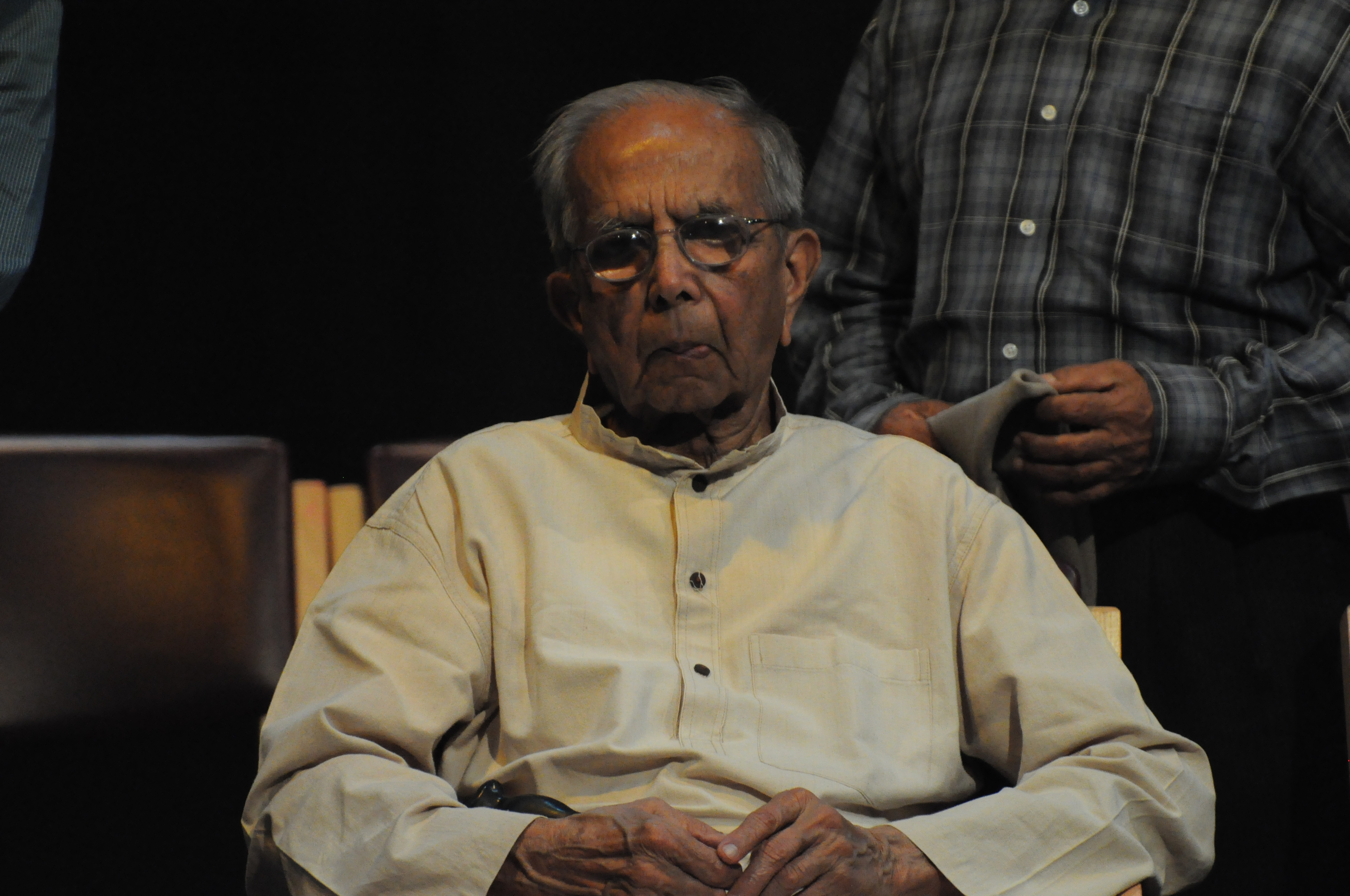 ಕನ್ನಡ: ವಿಜ್ಞಾನ ಬರಹಗಾರ, ಜೆ ಆರ್ ಲಕ್ಷ್ಮಣರಾವ್